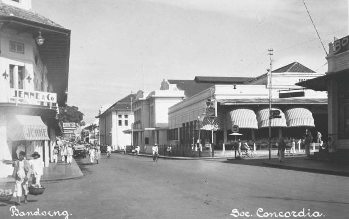 Foto. Straatbeeld Bandoeng met Sociëteit Concordia